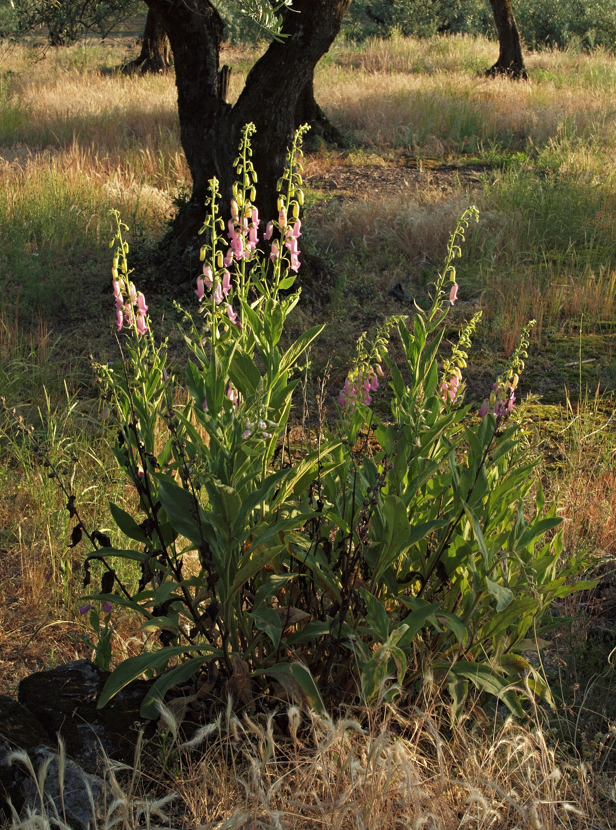 Digitalis thapsi. Losar de la Vera (Cáceres, España)